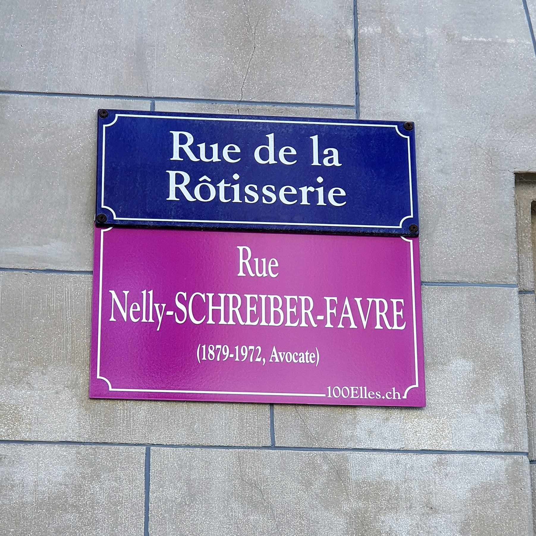 Plaque temporaire de rue apposée dans le cadre du projet 100elles à Genève en 2019